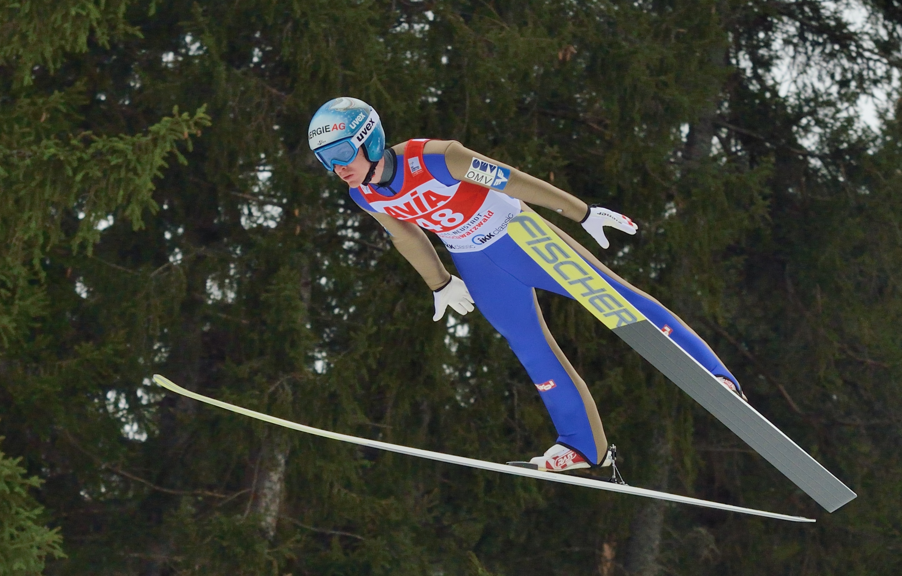 FIS Ski Weltcup Titisee-Neustadt 2016: Michael Hayböck